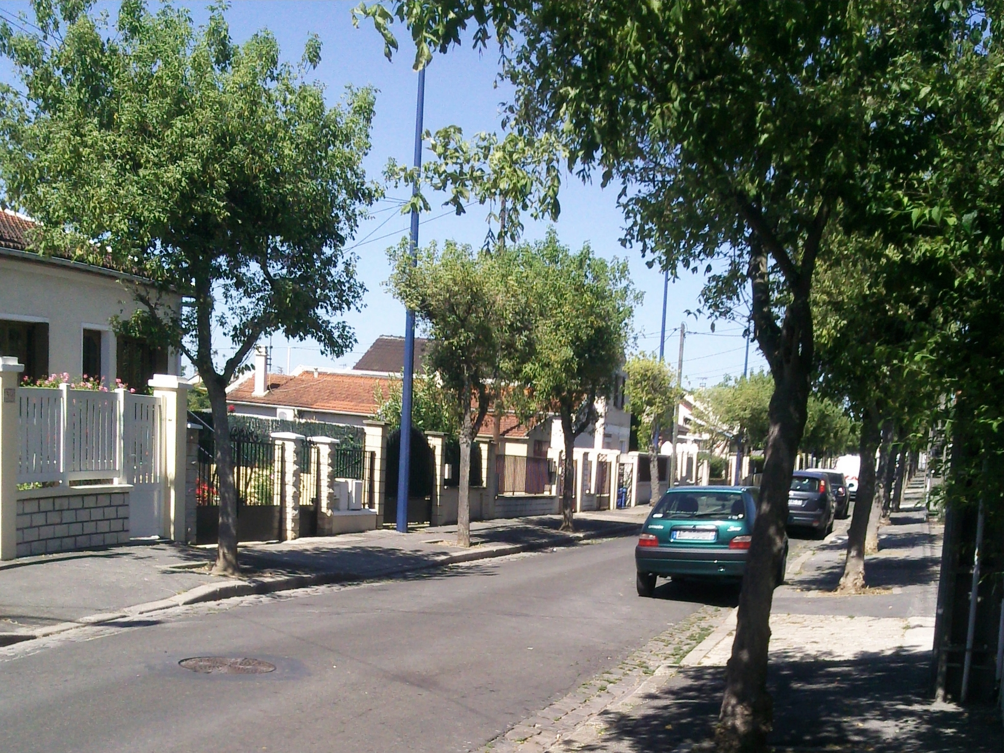 Drancy, rue Henri Rouanet, zone pavillonnaire, quartier des Oiseaux